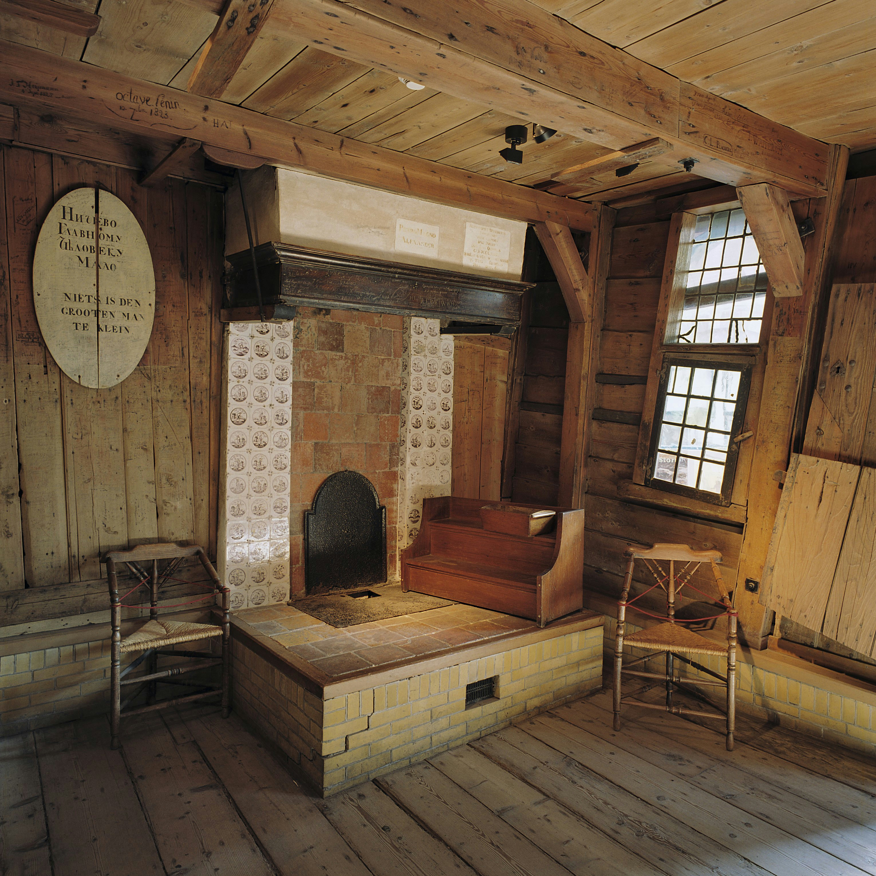 Czaar Peterhuisje - Museum: Interieur, overzicht van de schouw in het interieur van het houten huis binnen het stenen huis